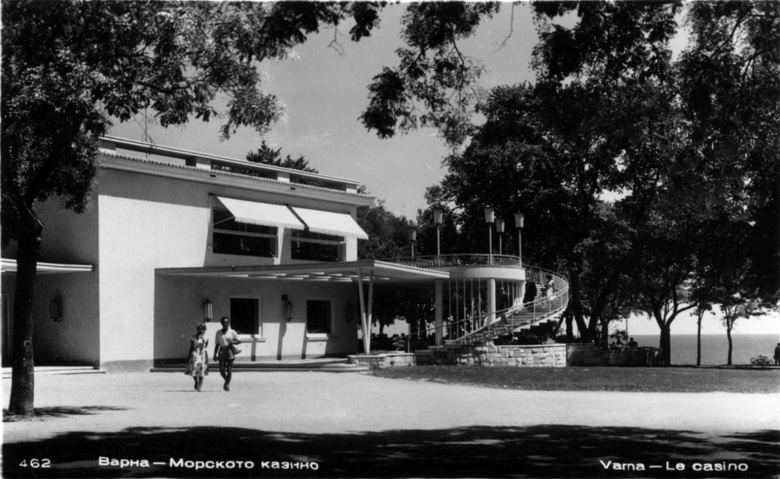 Облик на Морско казино по проект на арх. Панайот Минков от 1959г.